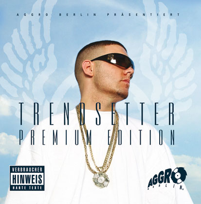 Cover des Albums „Trendsetter“ (Premium Edition)